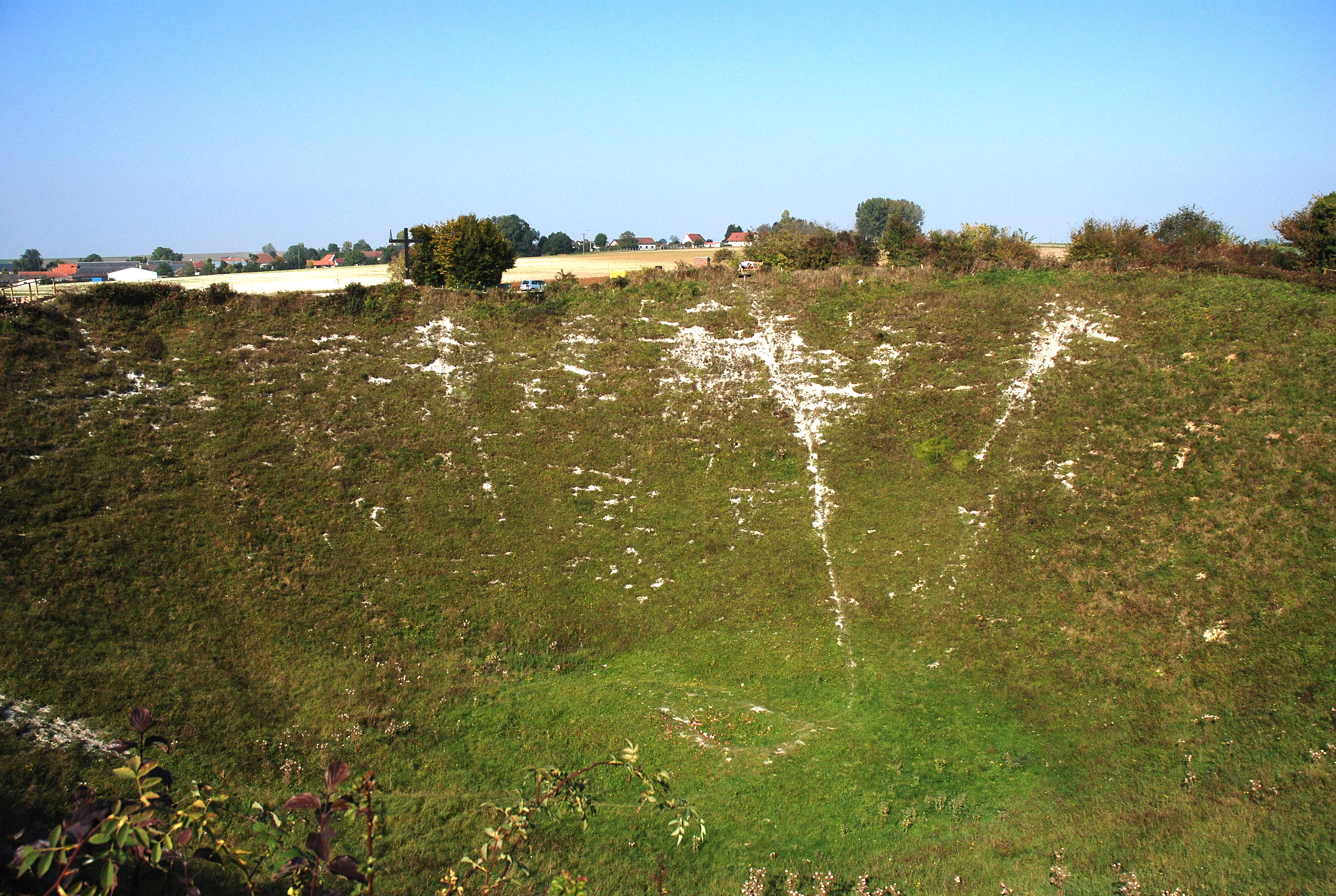 Lochnagar Crater in Ovillers-la-Boisselle, Frankrijk